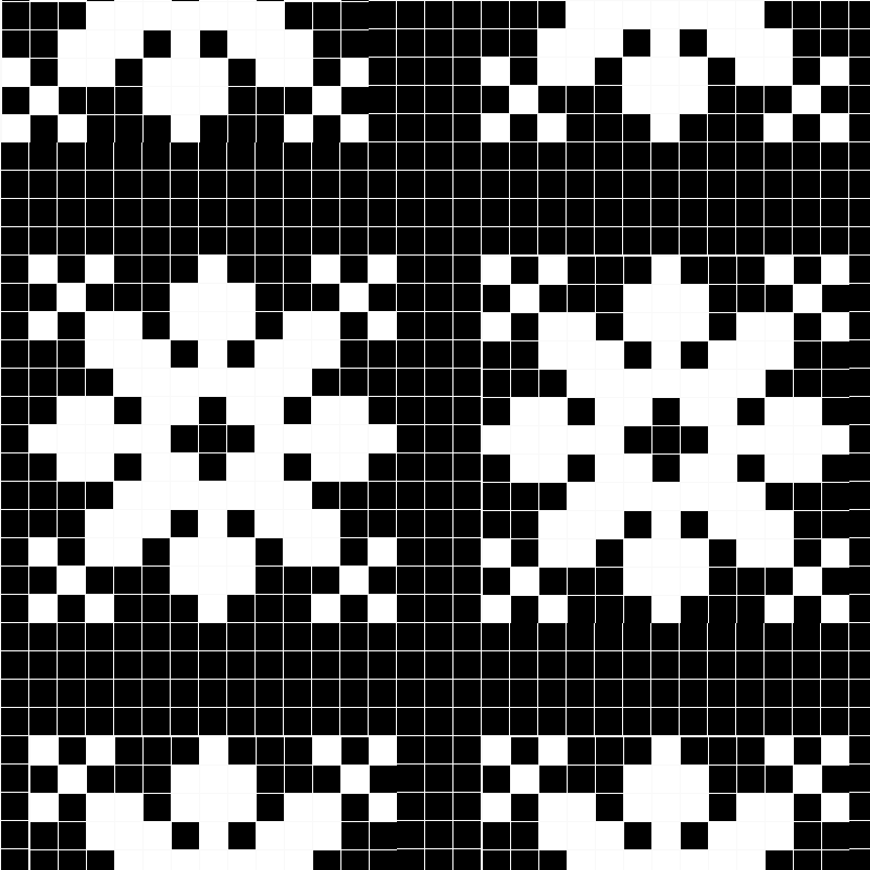 Motif norvégien cristal de neige